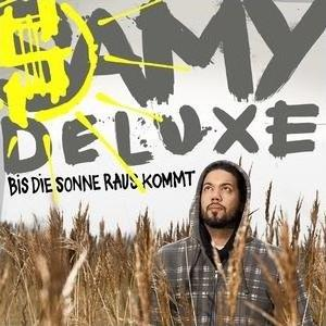 Cover der Single „Bis die Sonne raus kommt“